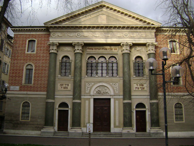 Tempio israelitico, Piazza Mazzini, Modena